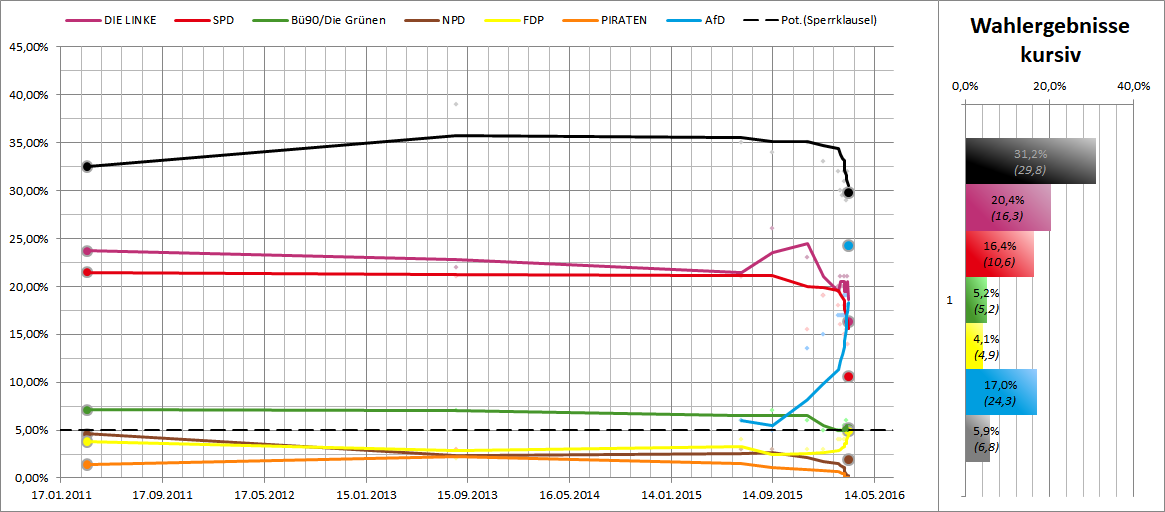 Dies ist ein Diagramm, das Mittelwerte der verschiedensten Umfragen & Prognosen beinhaltet.